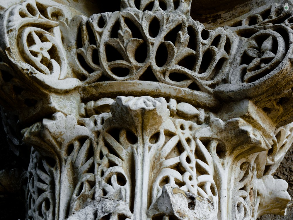 Detalle Columna del yacimiento Arqueológico de Medina Azahara